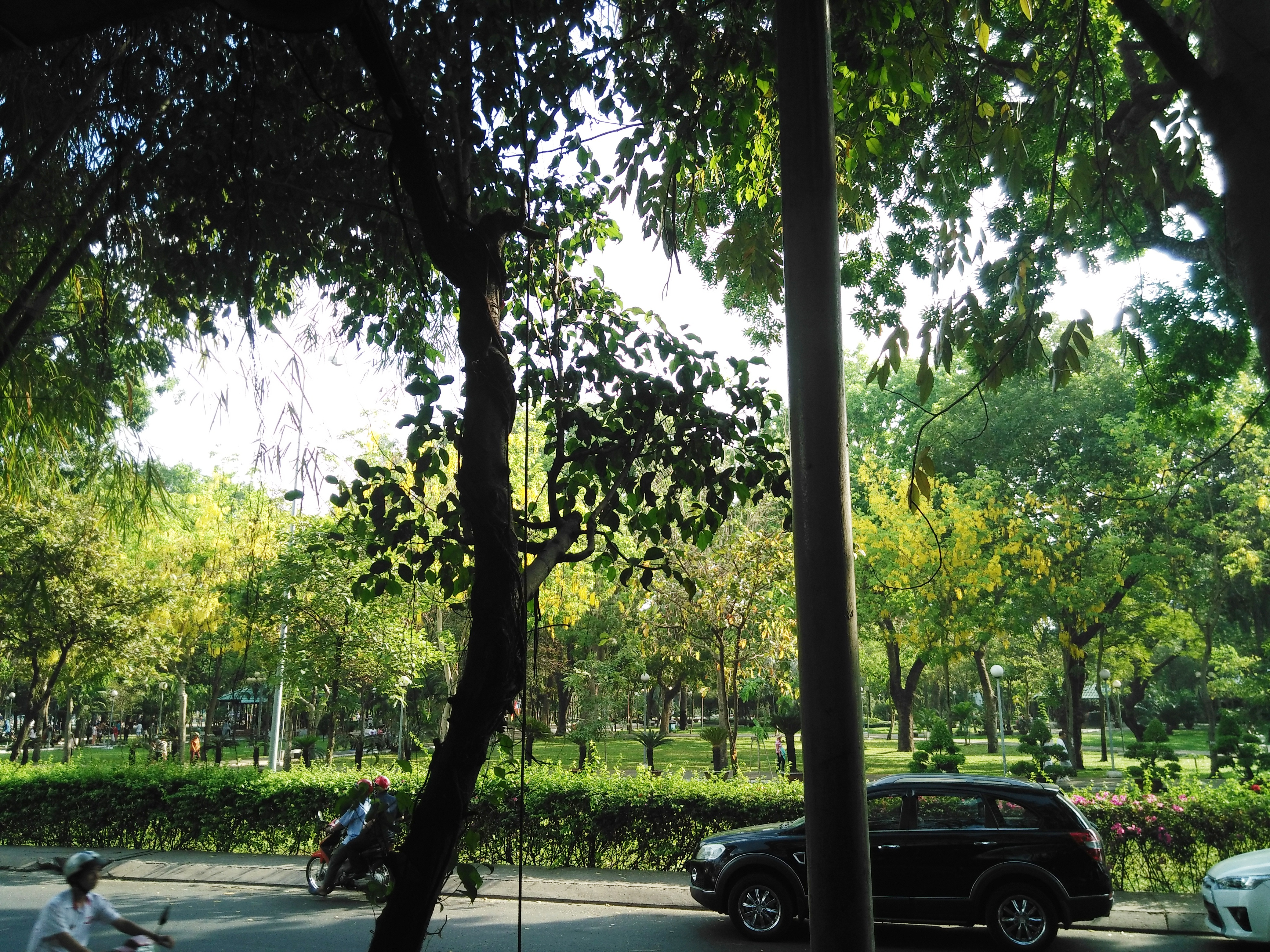 Hình tự chụp bằng di động cá nhân về công viên Gia Định